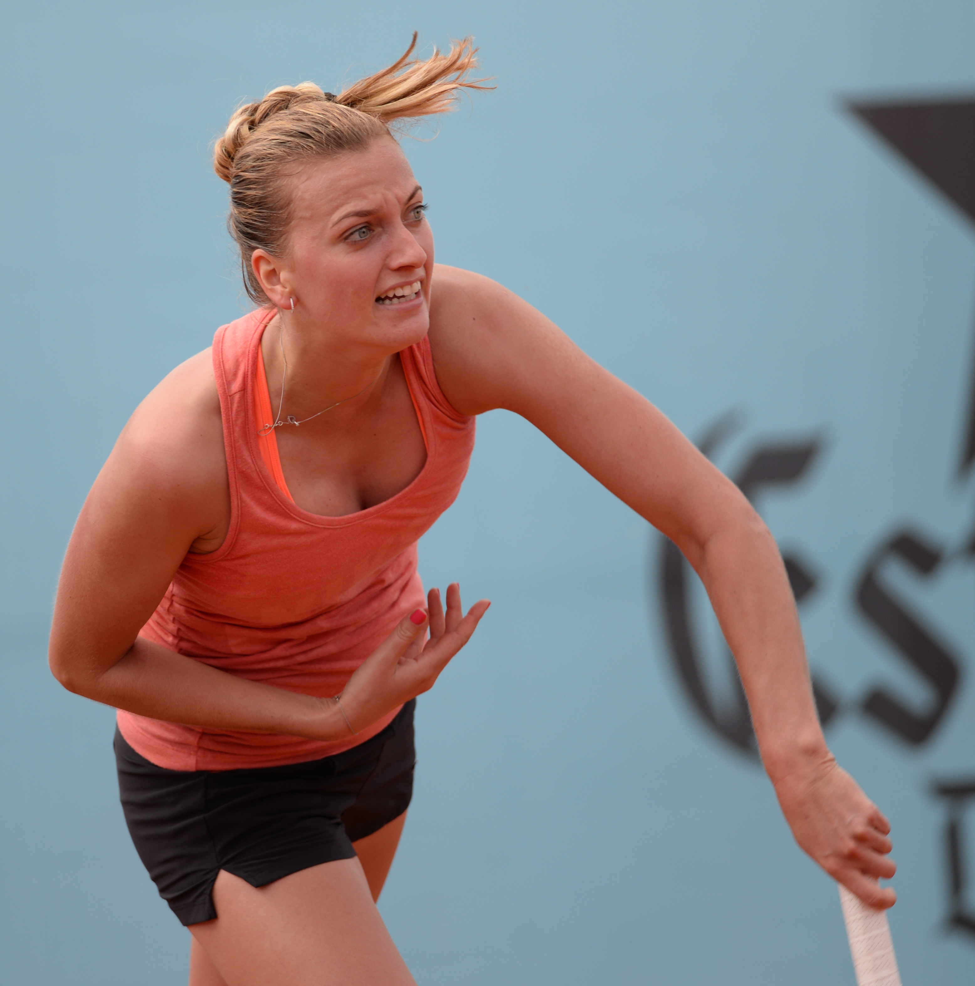 Petra Kvitova